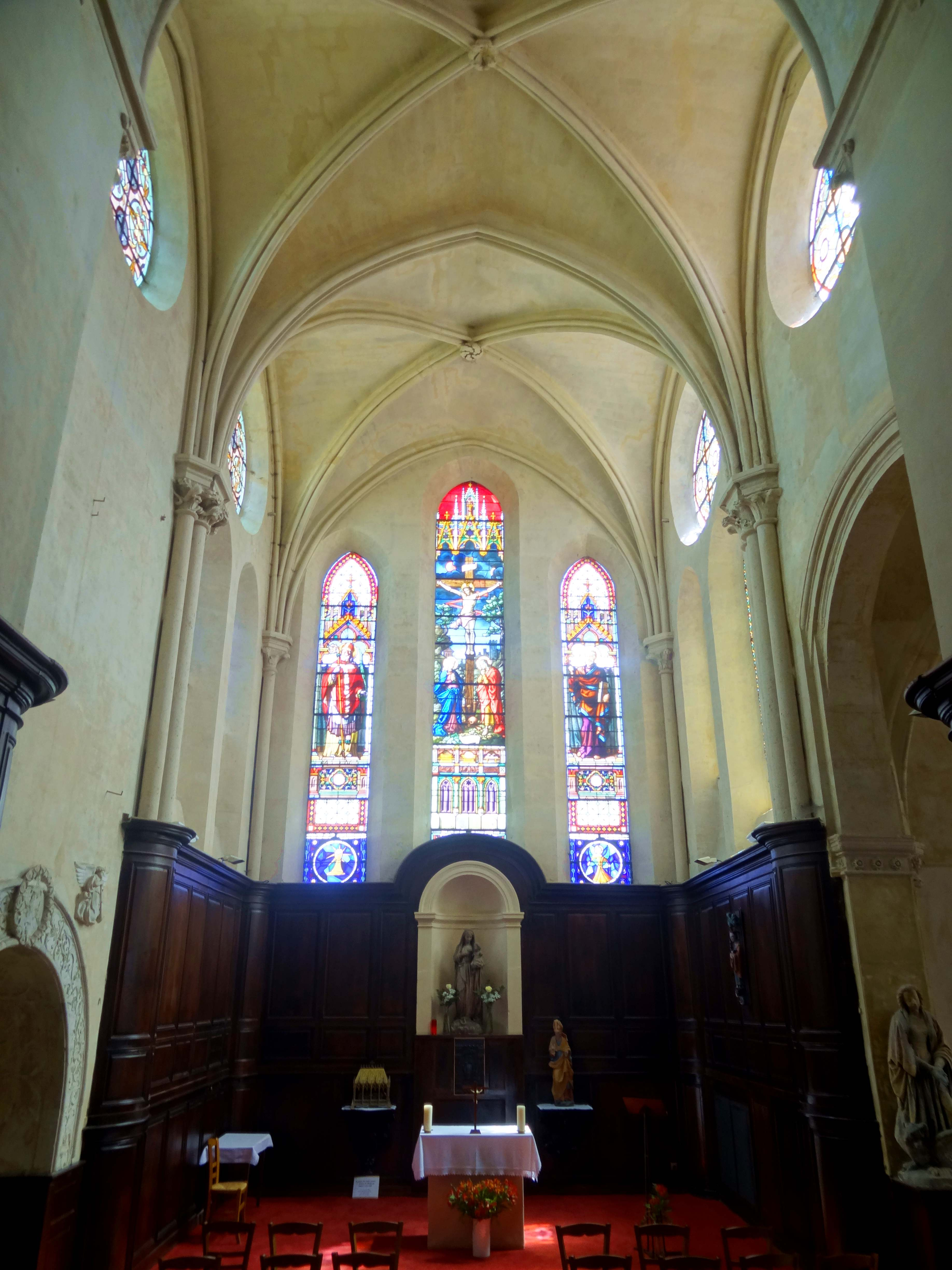 Intérieur de l'église - voir titre.